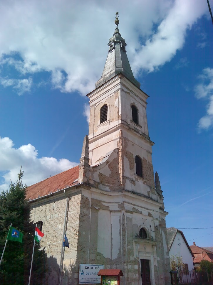 Áporka református templom